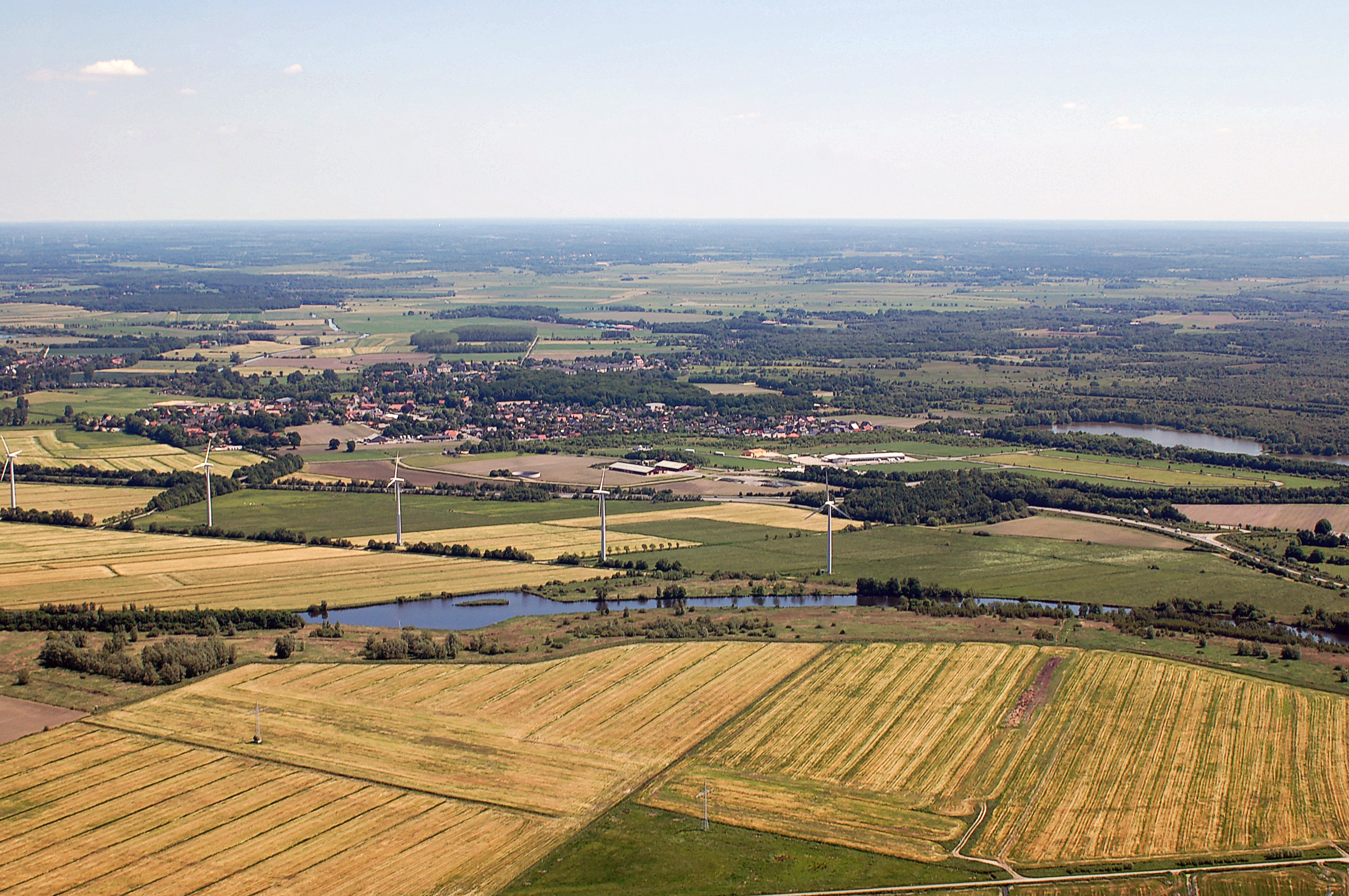 Stotel. Luftbilder von der Nordseeküste 2012-05